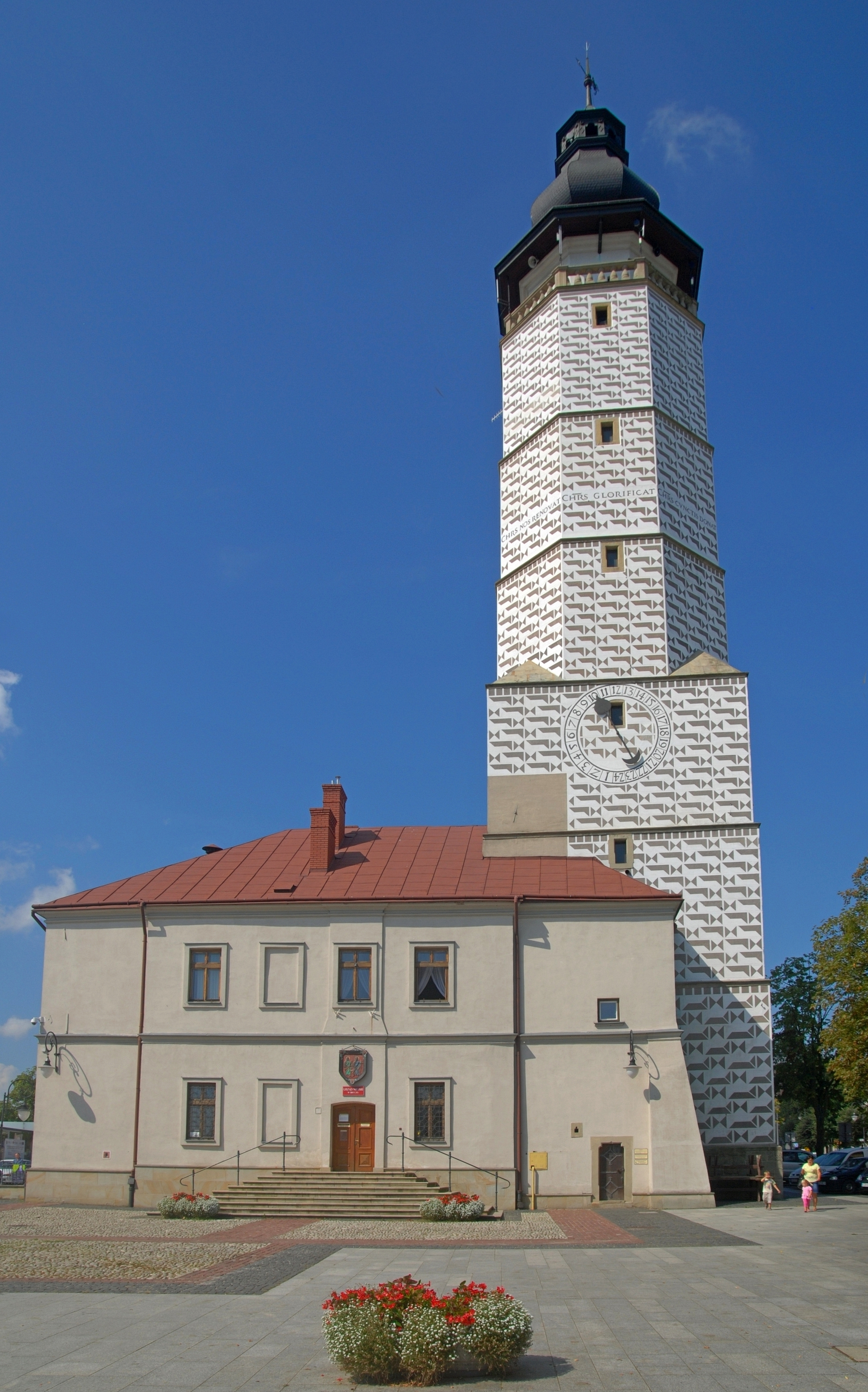 miasto Biecz